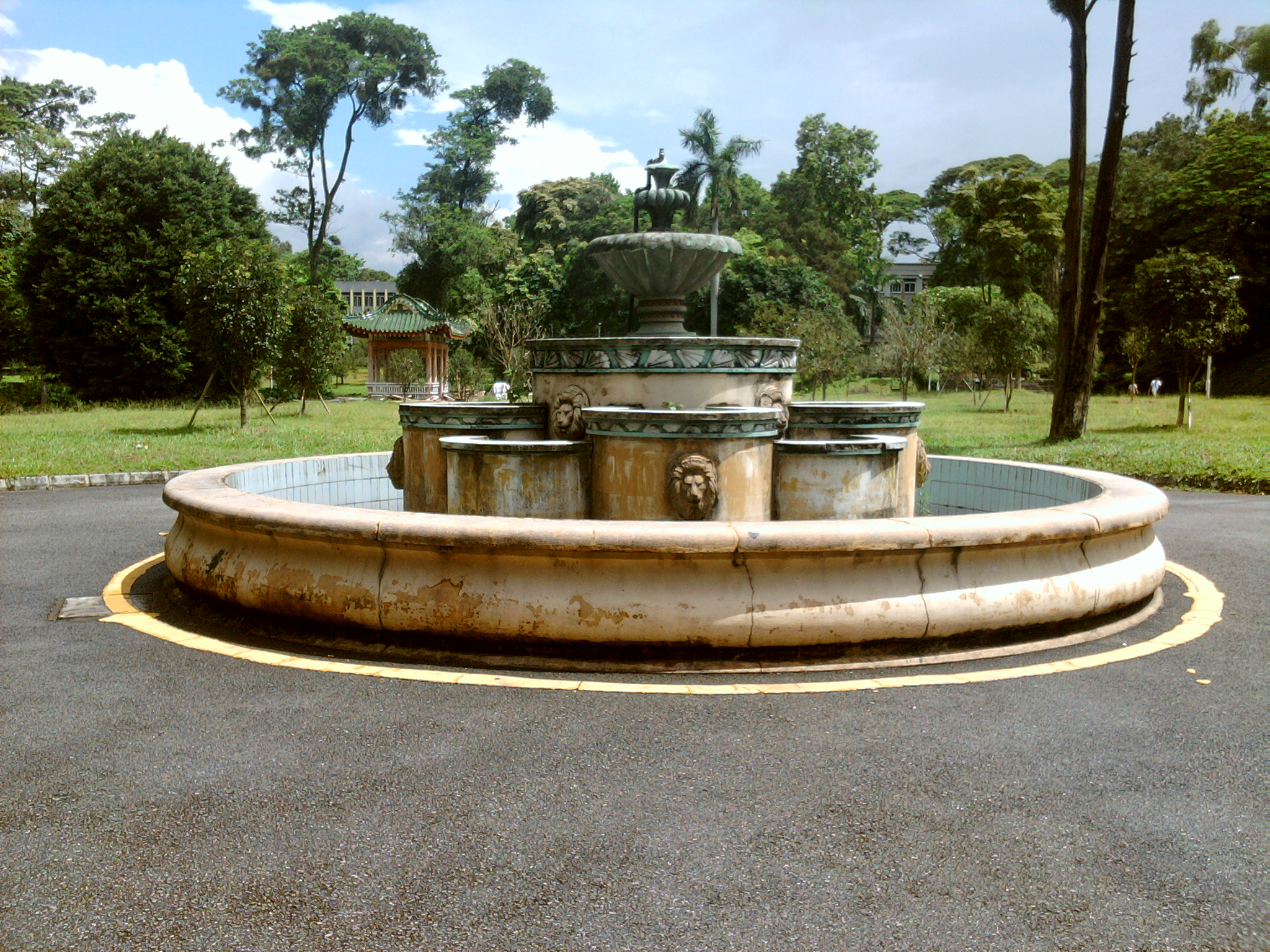 國立中山大學獅頭噴水池，現位於華南農業大學內。